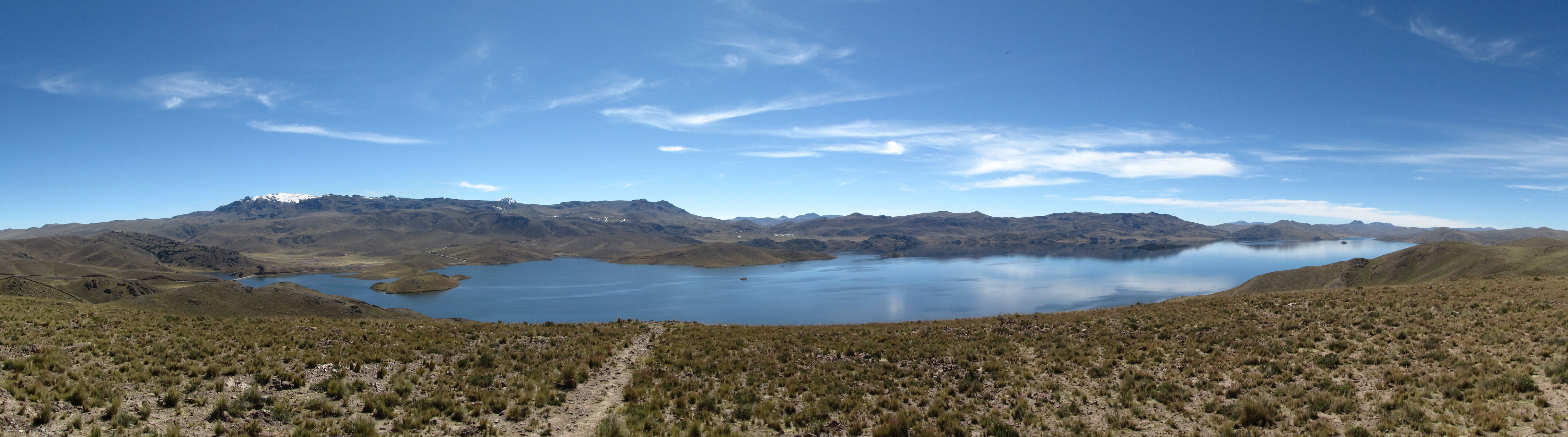 Panoramica de la laguna Lagunillas, Perú